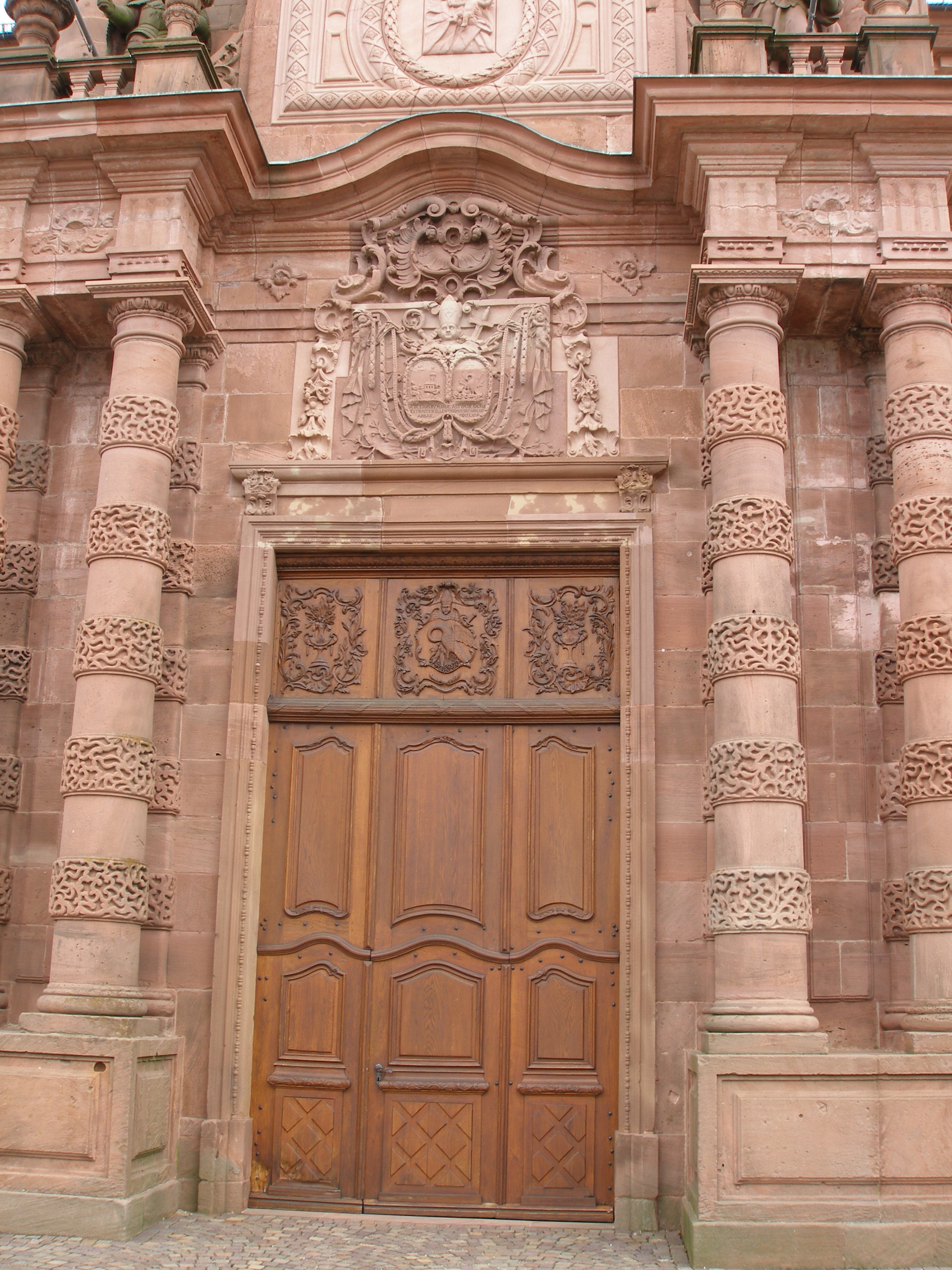 Kloster Schuttern